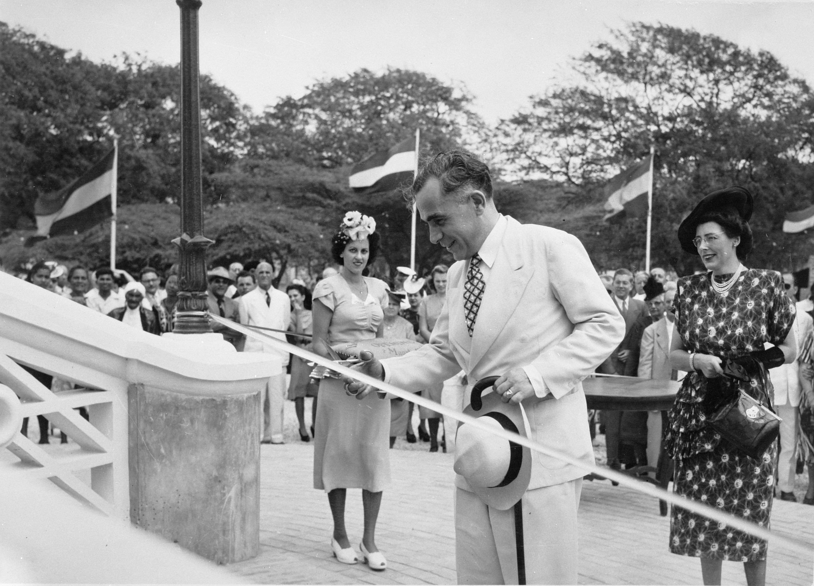 Collectie / Archief : Fotocollectie Anefo Reportage / Serie : [ onbekend ] Beschrijving : Dr Kasteel opent Curaçaosch Museum Annotatie : Repronegatief. De foto is van eerdere datum dan de registratie in de foto-administratie 9-12-1948 Datum : 7 maart 1948 Locatie : Curaçao, Willemstad Trefwoorden : musea, openingen Persoonsnaam : Kasteel, P.A. Fotograaf : Foto Fischer Auteursrechthebbende : Nationaal Archief Materiaalsoort : Glasnegatief Nummer archiefinventaris : bekijk toegang 2.24.01.09 Bestanddeelnummer : 902-6301